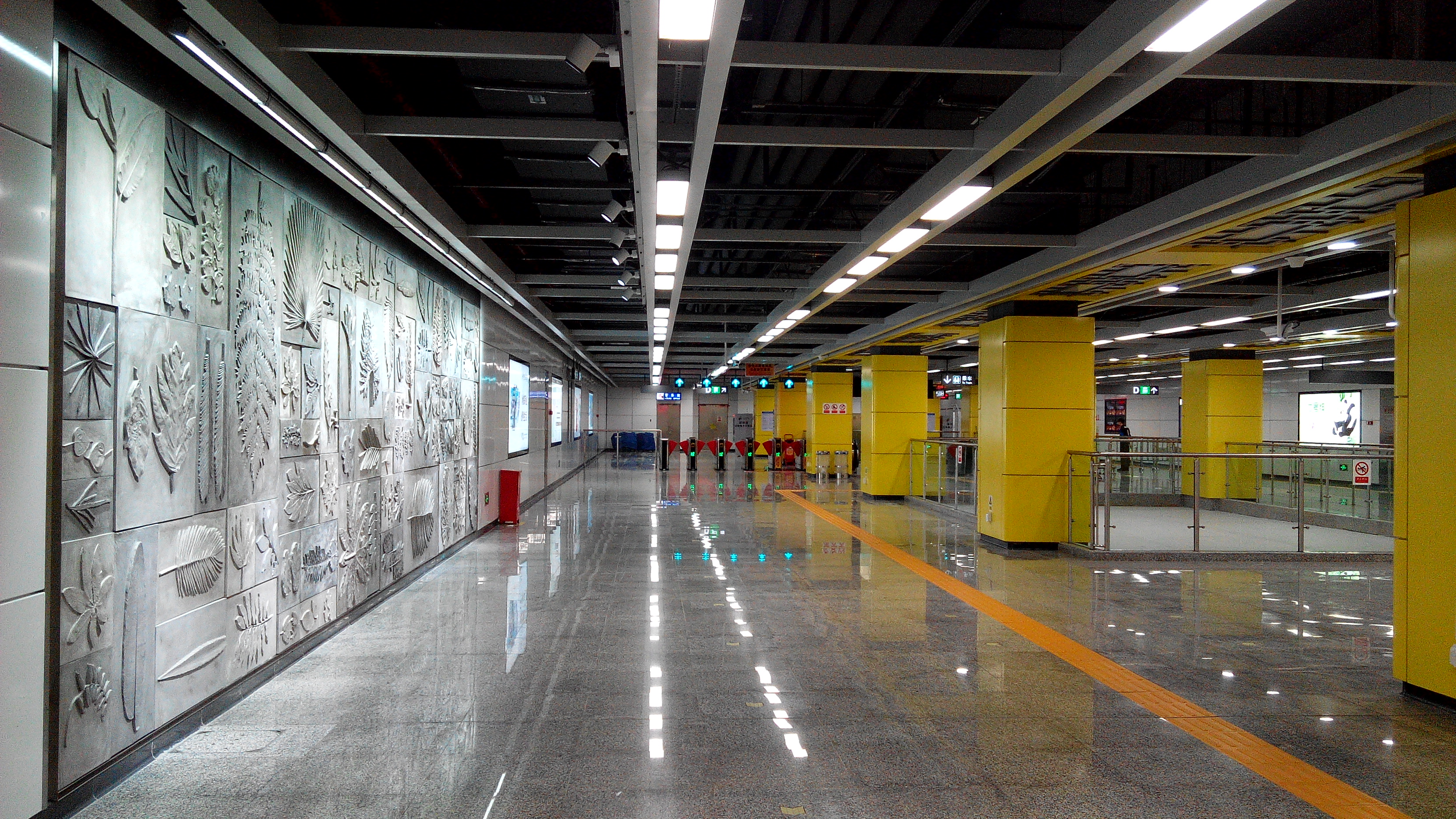 深圳地铁9号线 银湖站大堂